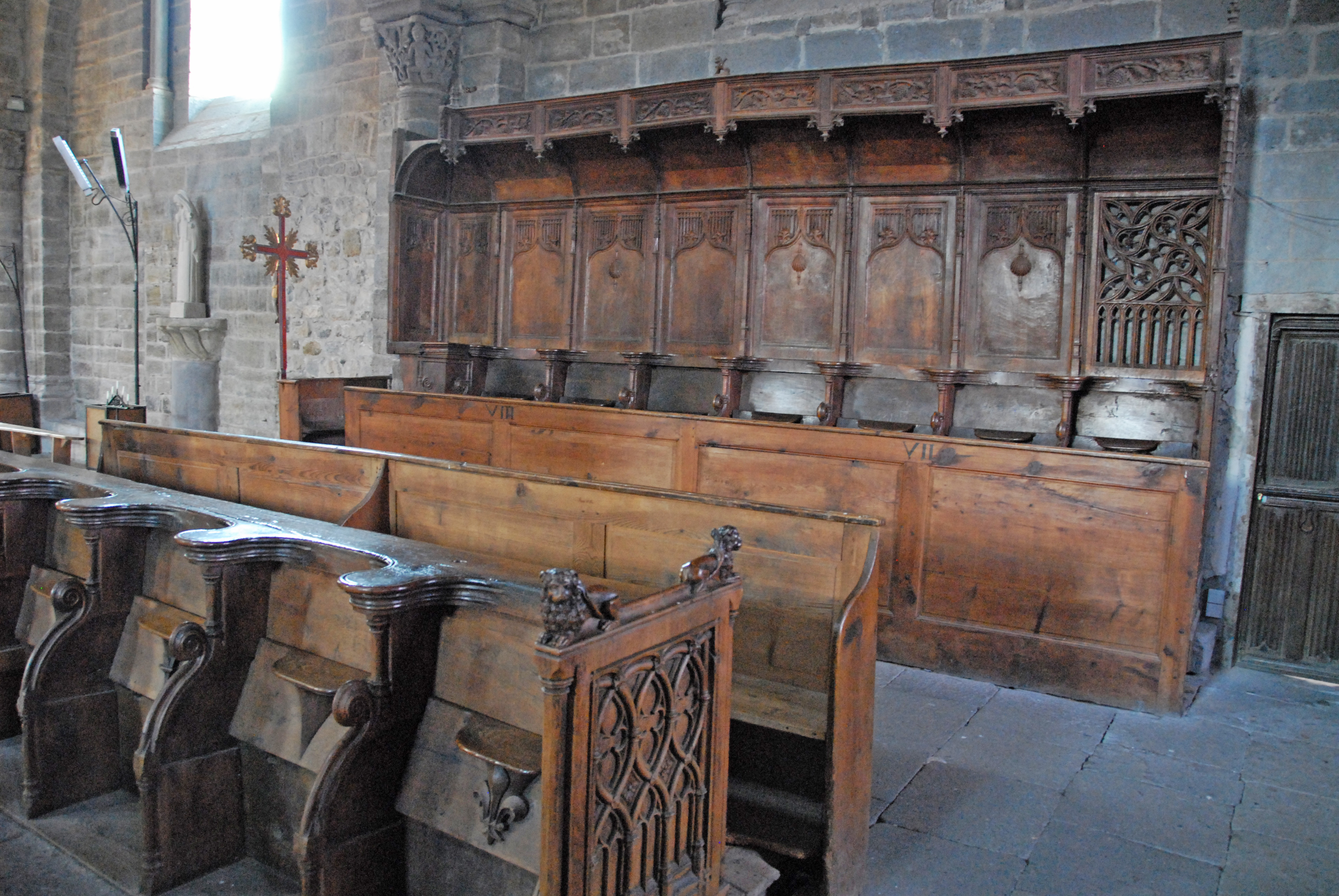 Chanteuges, Kirche, Chorgestühl im nördl. Seitenschiff